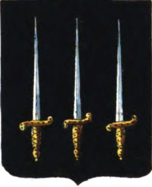 De sable à trois épées d'argent, garnies d'or, posées en pal, les pointes vers le haut.